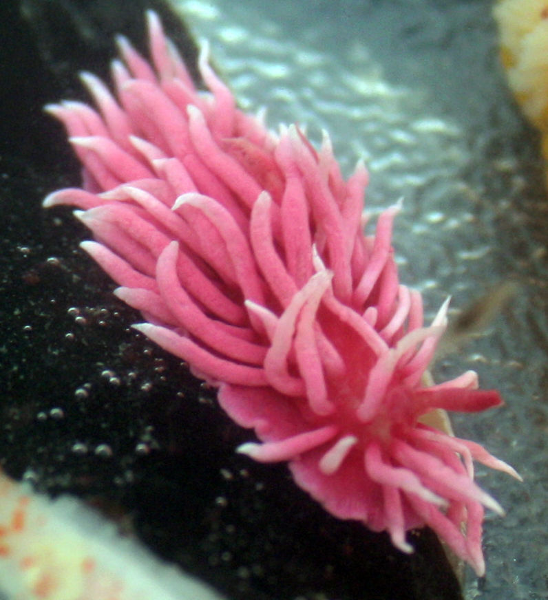 Okenia rosacea, Pillar Point, California, Estados Unidos